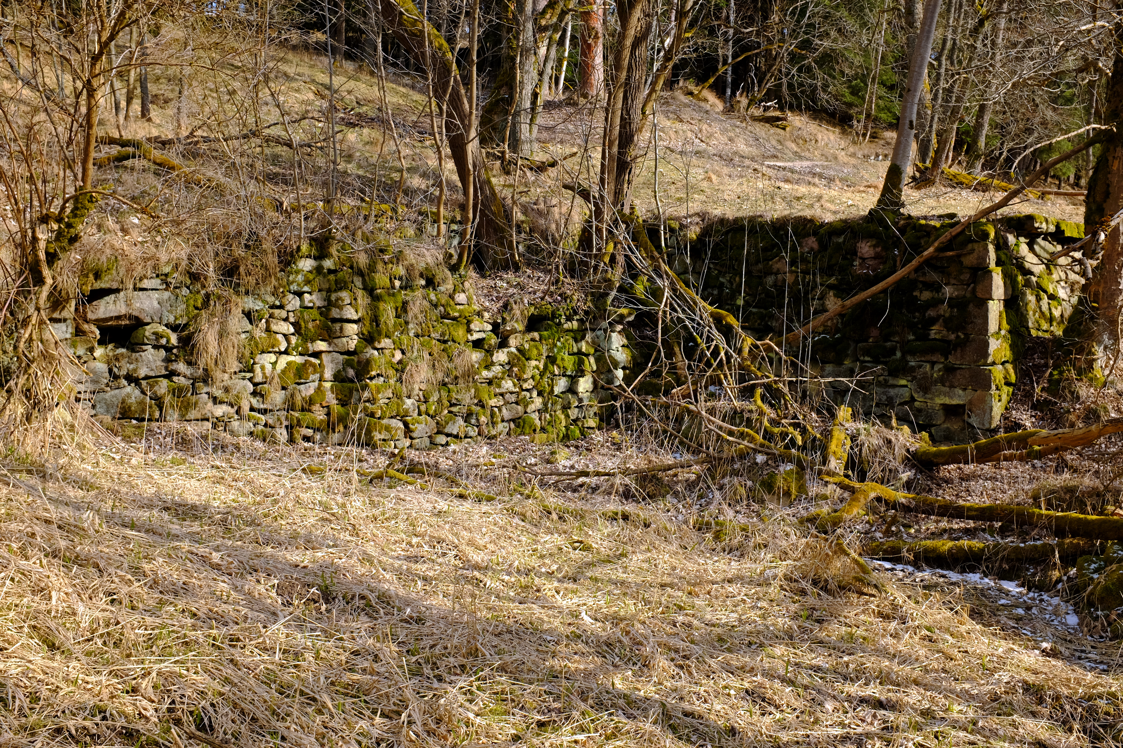 Lobezský potok u Podstrání, ruina mlýna (Seffův mlýn) u soutoku s Chalupeckým potokem, Slavkovský les, okres Sokolov